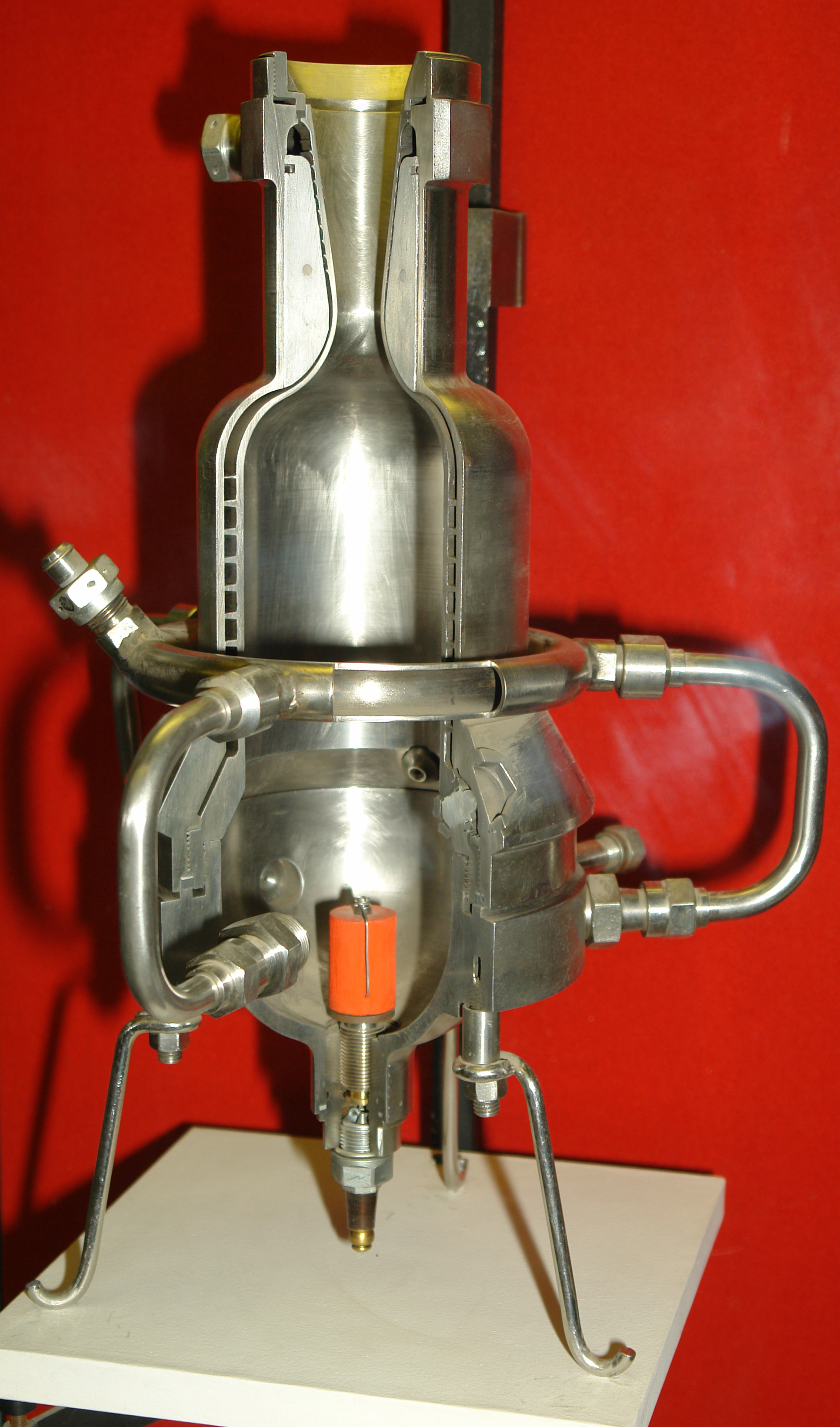 Опытный жидкостный ракетный двигатель ОРМ-65. Музей космонавтики и ракетной техники; Санкт-Петербург. This photograph was taken in Museum of Space and Missile Technology (Saint Petersburg) Object location59° 57′ 07″ N, 30° 19′ 16″ E